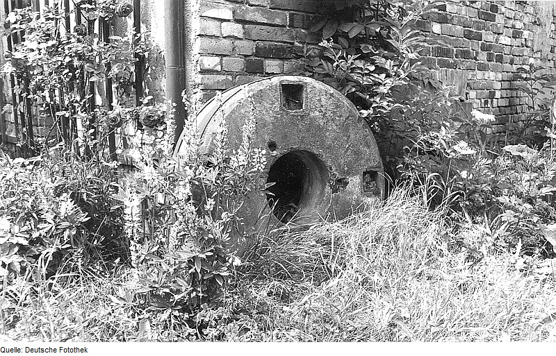 Original image description from the Deutsche Fotothek Rietschen-Viereichen-Mocholz. Ehem. Mühle, Mühlstein